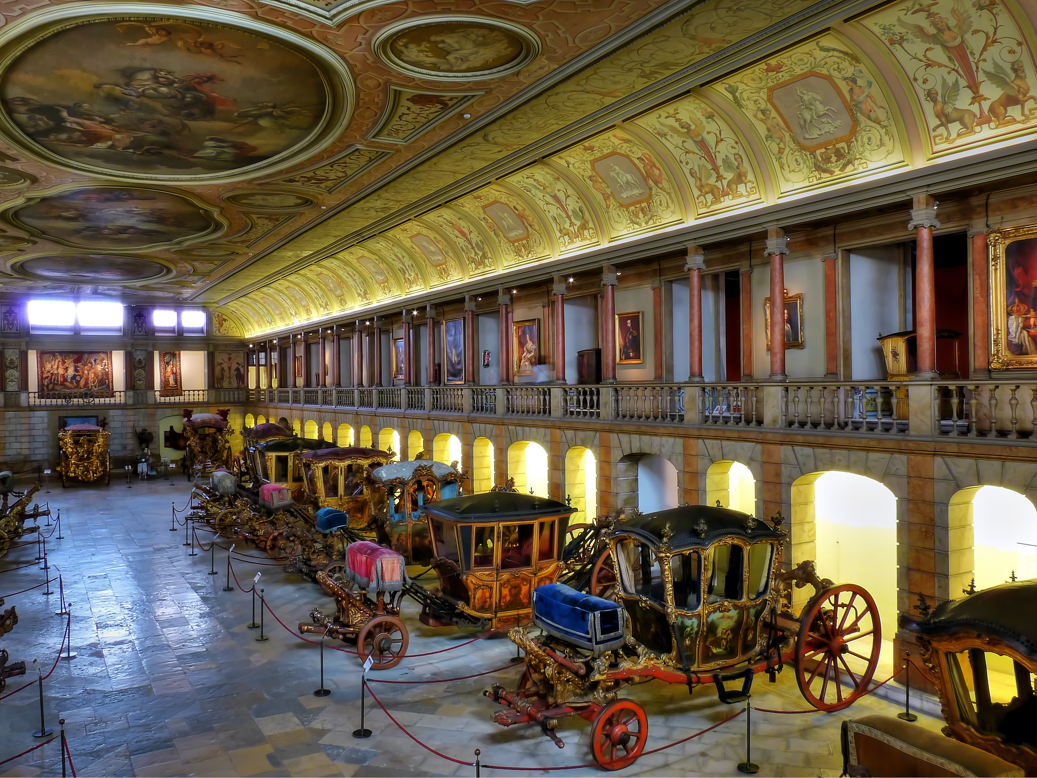 Belém, Lissabon/Lisboa/Lisbon, Portugal Kutschenmuseum in der ehemaligen Reitschule des königlichen Schlosses (Palast von Belém) in Lissabon Coach museum in the former riding school of the Royal Palace (Palace of Belém) in Lisbon HDR, 3xp, -1,0,+1